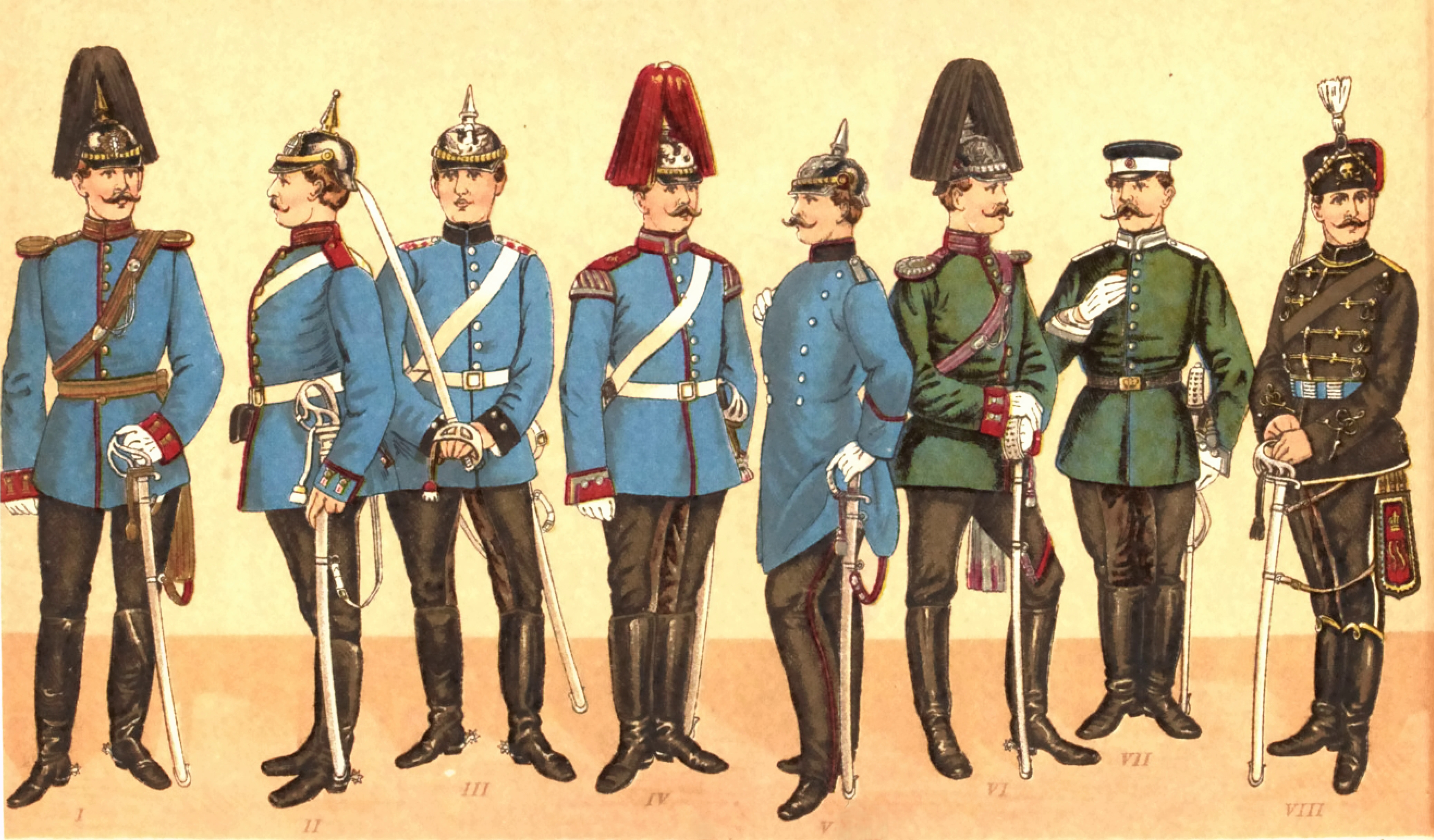 Mecklenburger Dragoner Uniformen